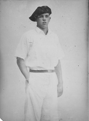 Atano VII in 1928